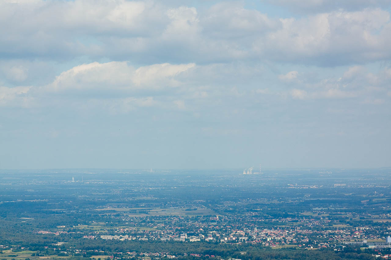 Widok z góry Żar w kierunku północnym. Na horyzoncie elektrownia Jaworzno III.